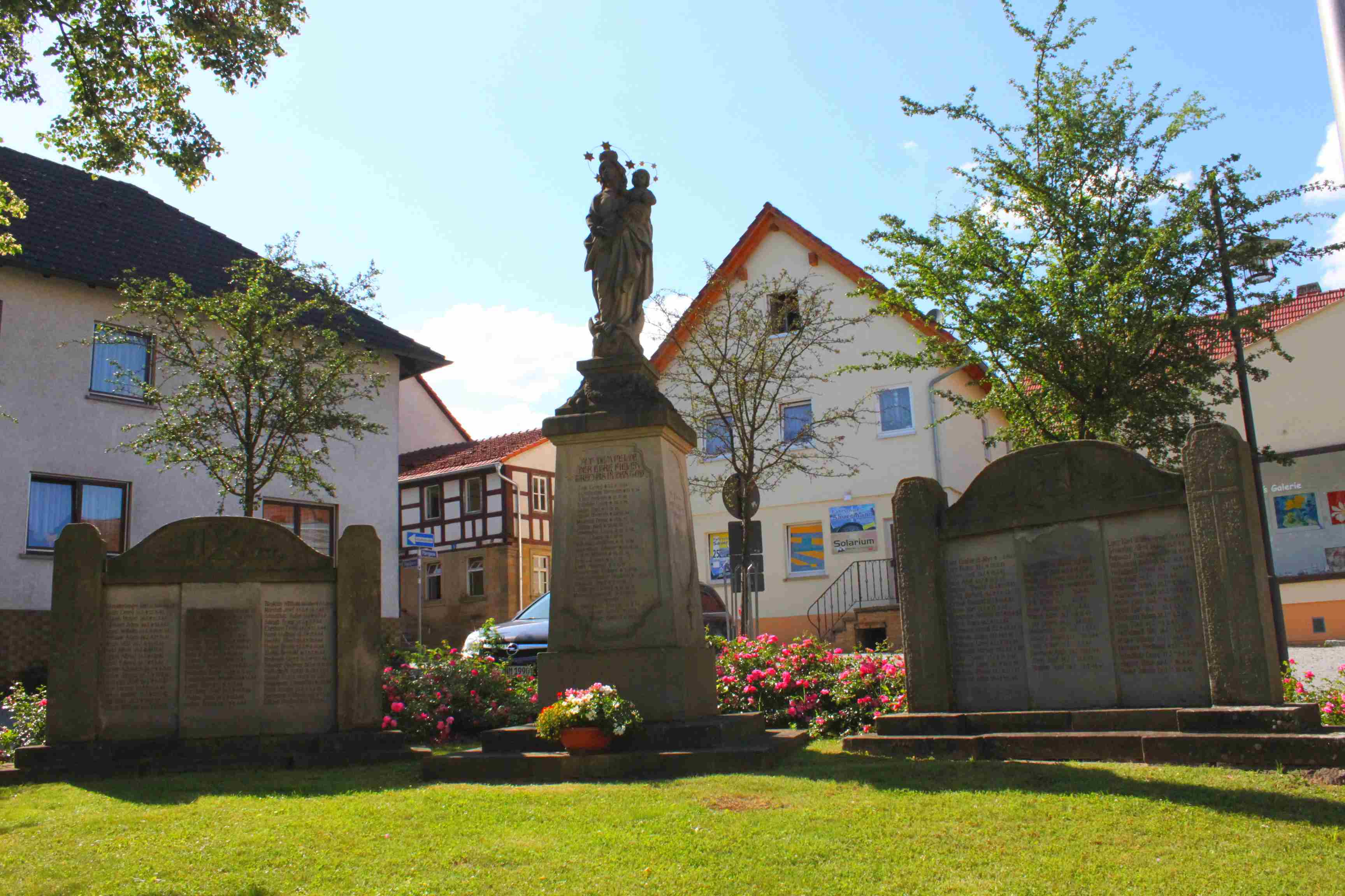 Das Kriegerdenkmal in der Ortsmitte von Reckendorf